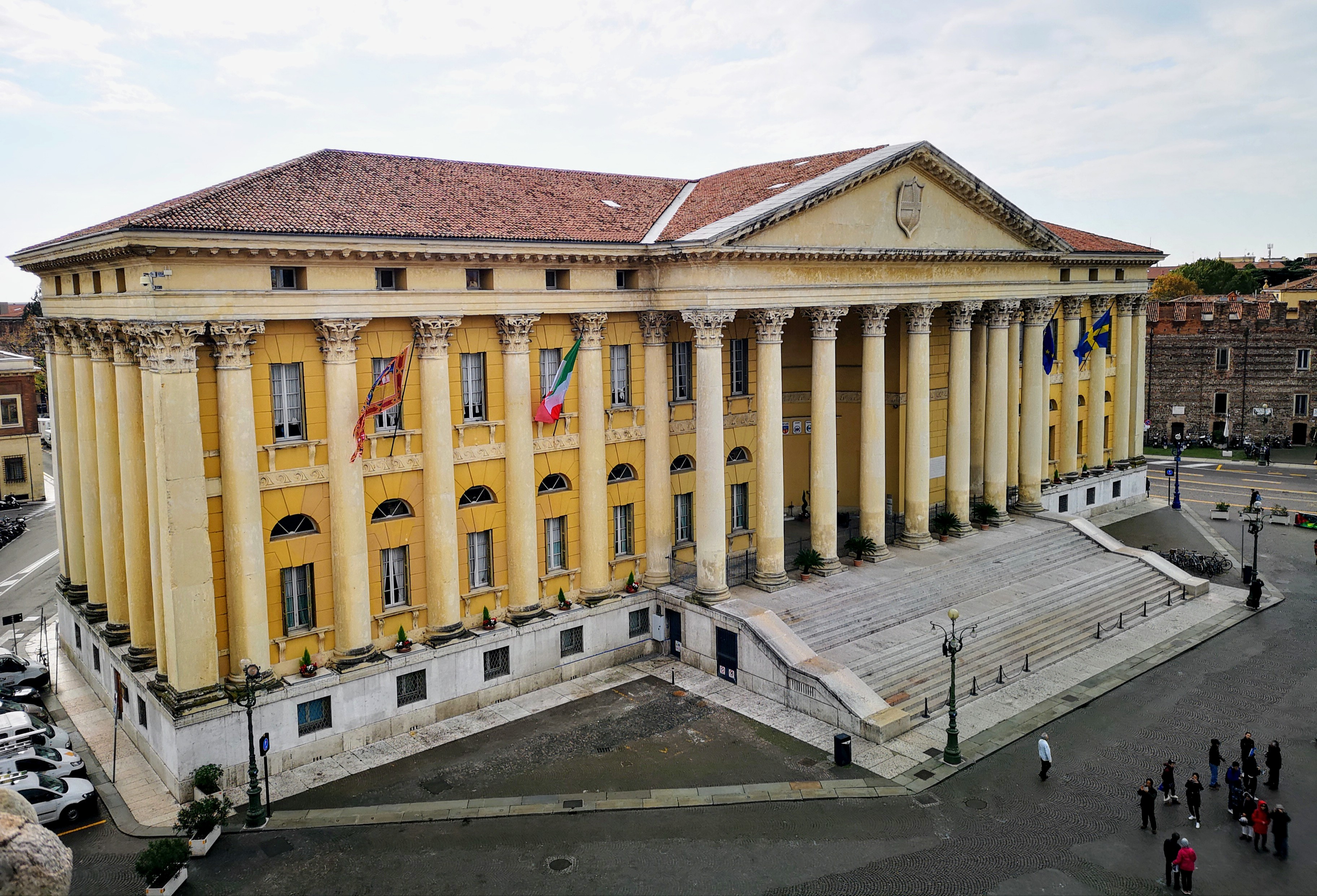 Palazzo Barbieri This is a photo of a monument which is part of cultural heritage of Italy.